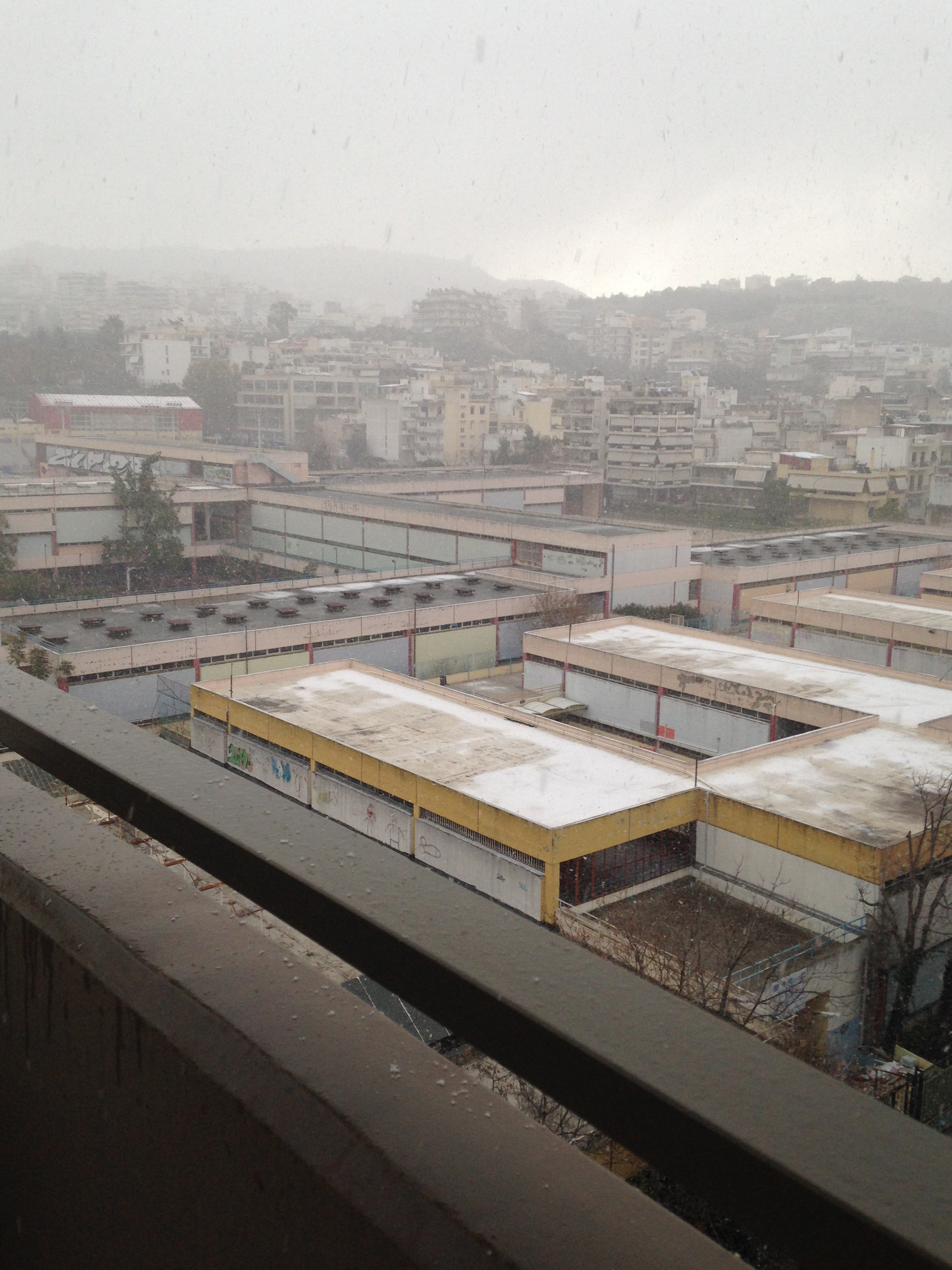 Χιόνια στο σχολικό συγκρότημα της Γκράβας